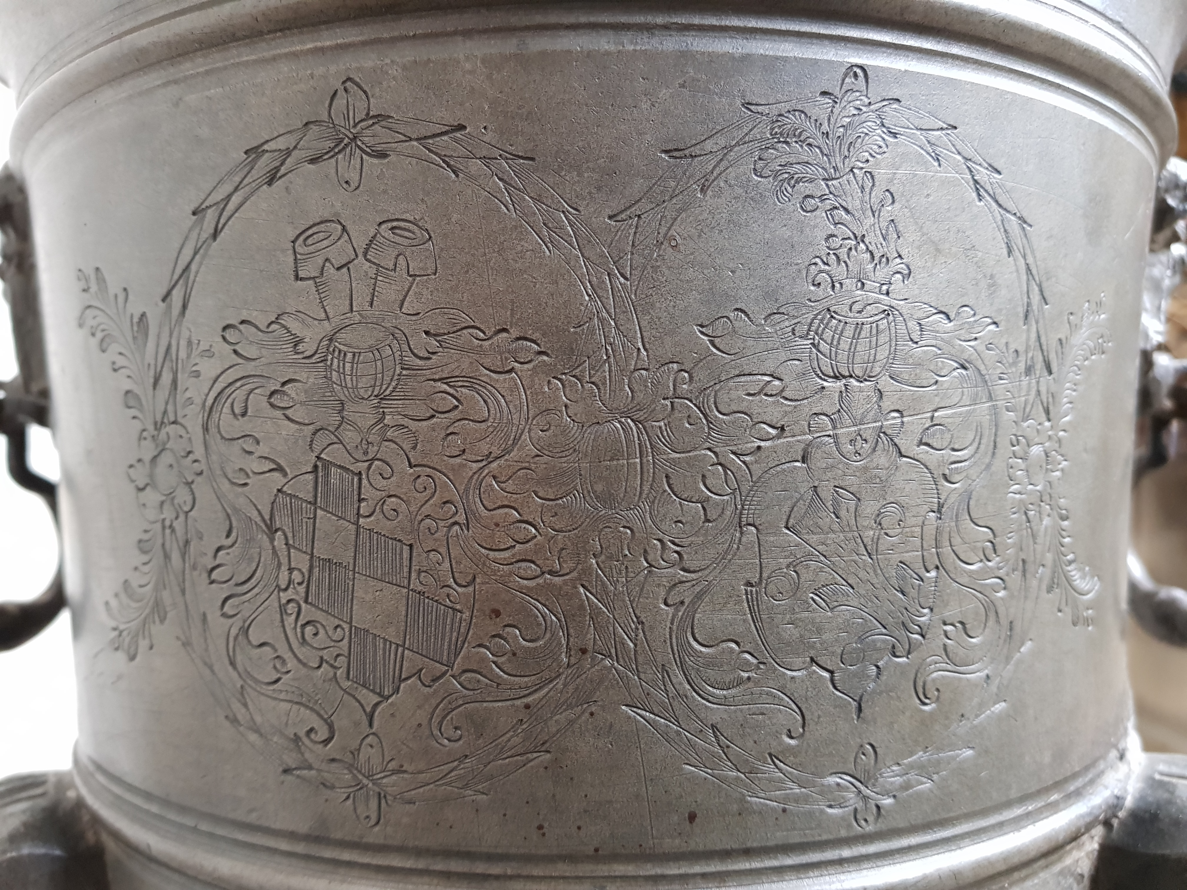 Křtitelnice v hradní kapli Korunování Panny Marie na Křivoklatě, detail: alianční znak Renšpergerů a Fictumů